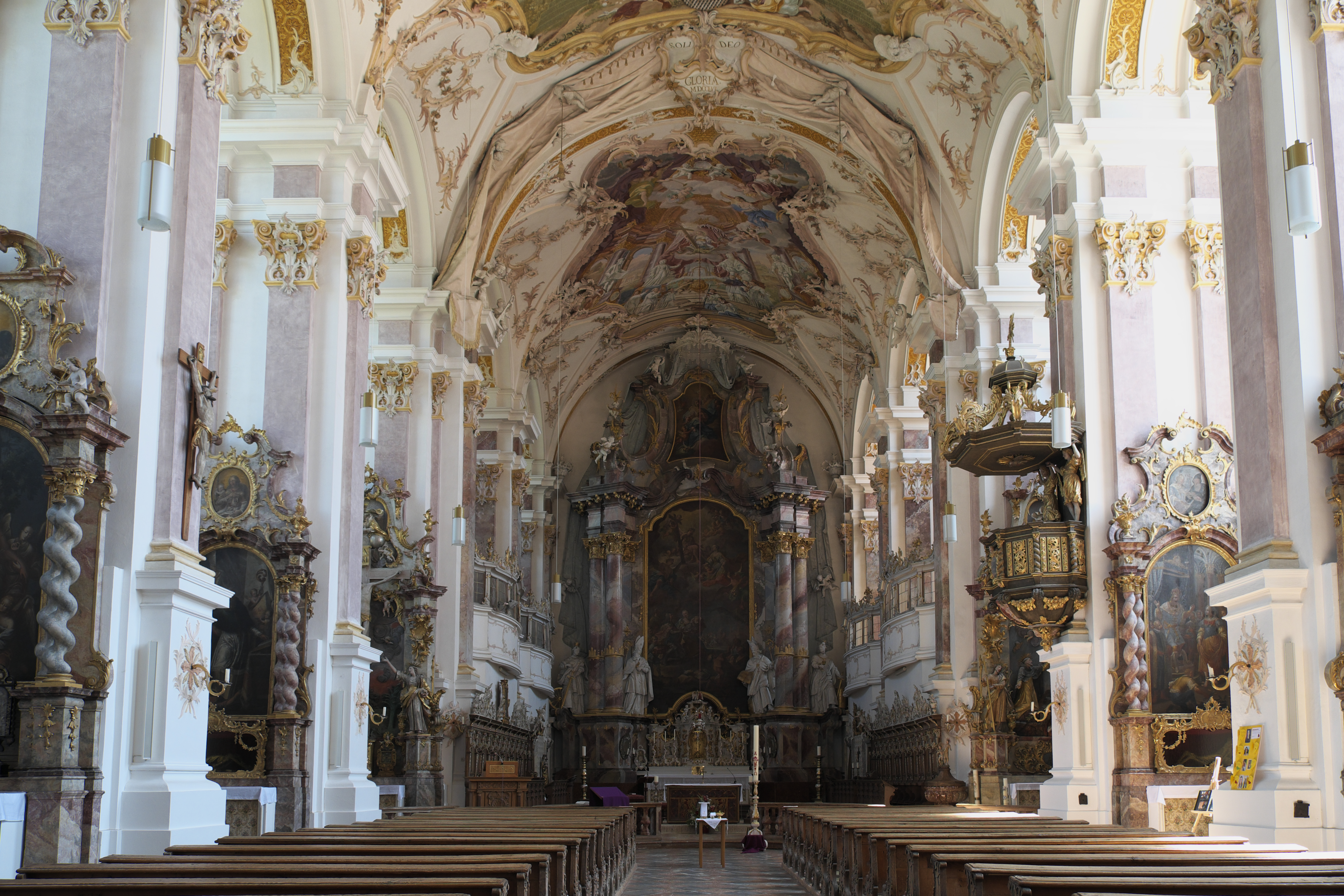 Ehemalige Augustiner-Chorherrenstiftskirche St. Margaretha in Baumburg an der Alz, einem Ortsteil von Altenmarkt an der Alz im Landkreis Traunstein (Bayern/Deutschland), Innenraum